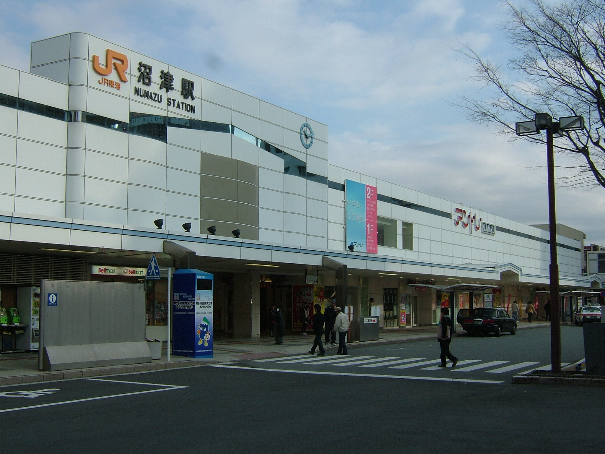 JR沼津駅南口